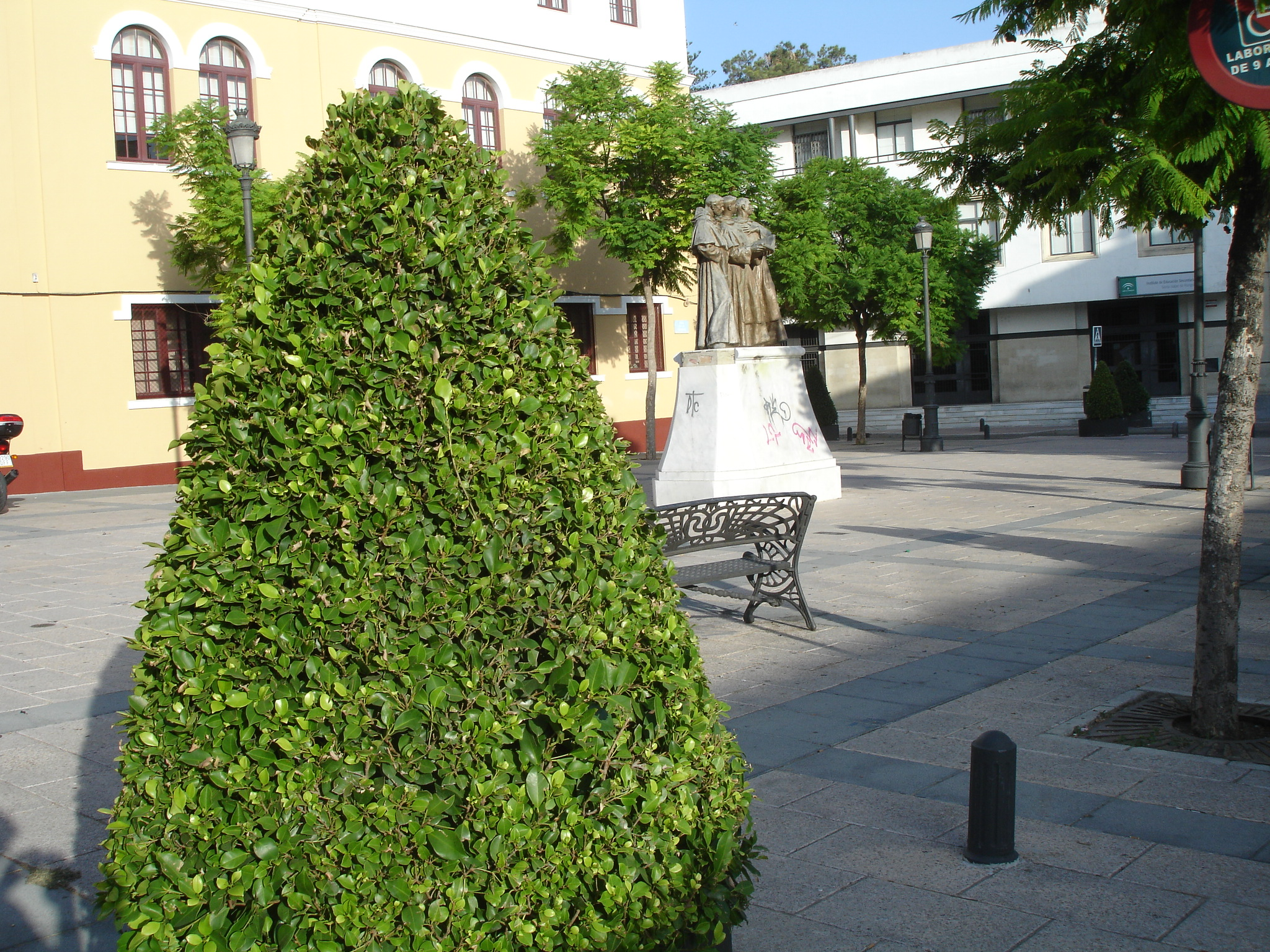 Moument to Mercedarios in Jerez de la Frontera, Andalusia (Spain)